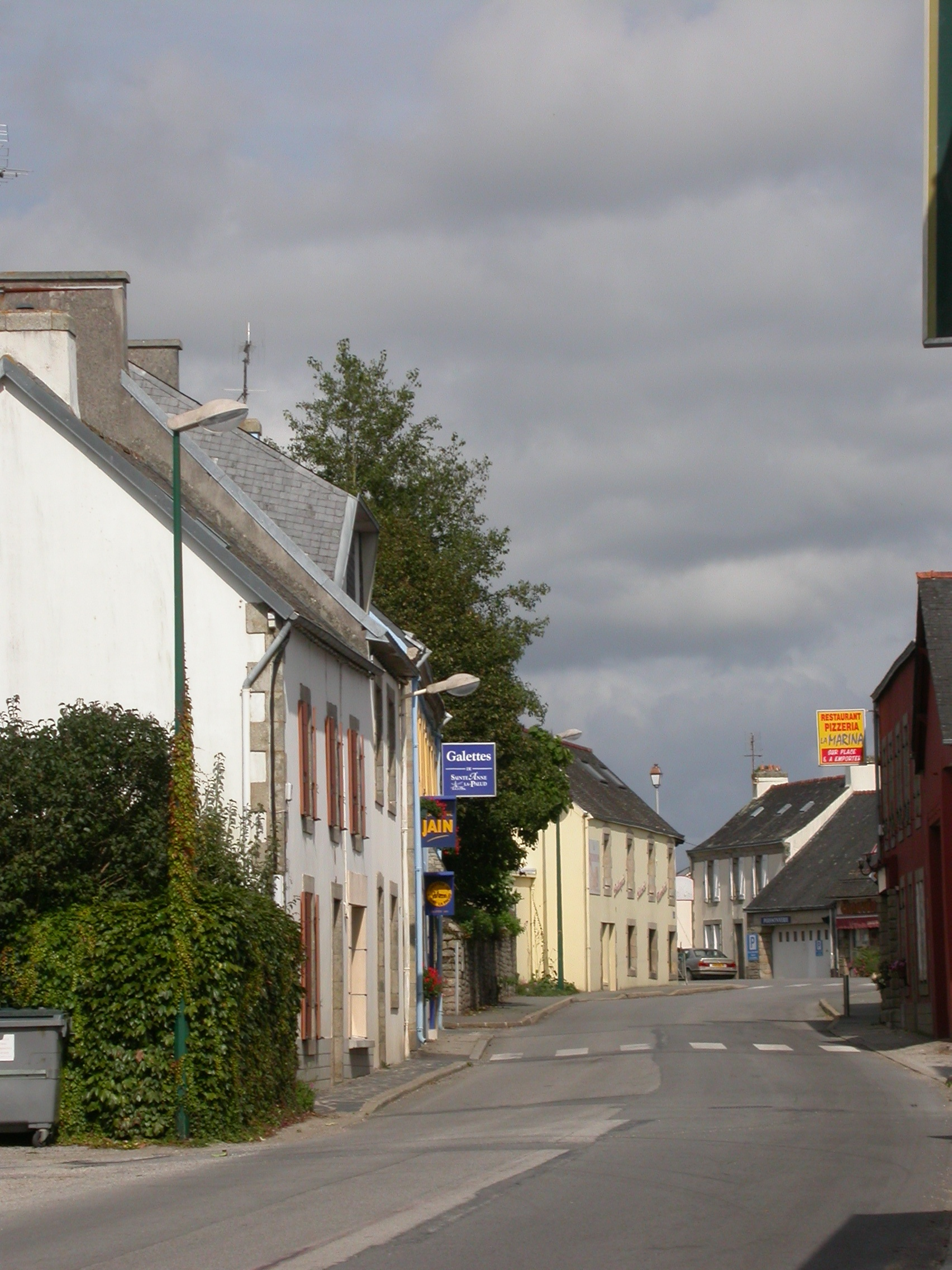 Sraid-bhaile Plonevez-Porzay i limistear Bro-Gerne in iar-dheisceart na Briotain.